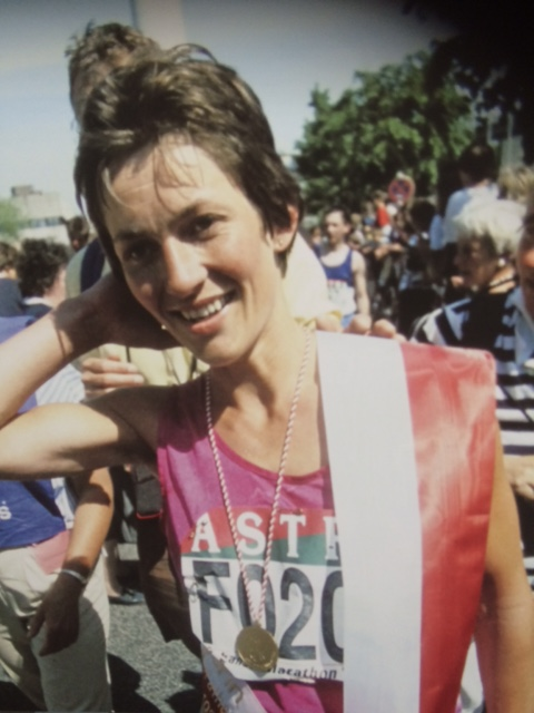 Jolanda Homminga bij overwinning Marathon Hamburg